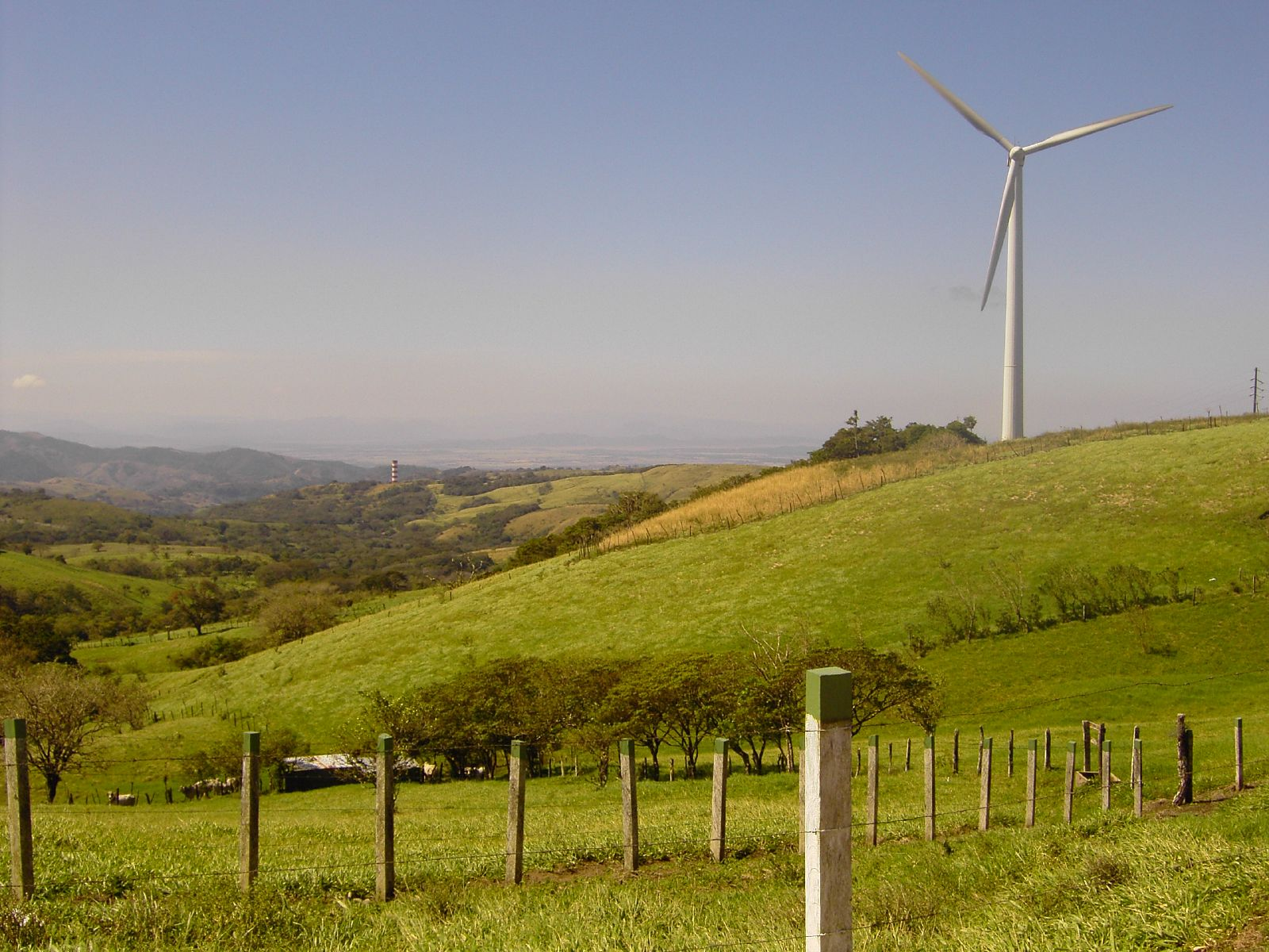 Windmill in Tilarán, Costa Rica